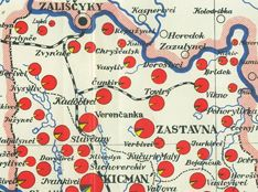 Фрагмент етнічної карти Буковини Аркадія Жуковського